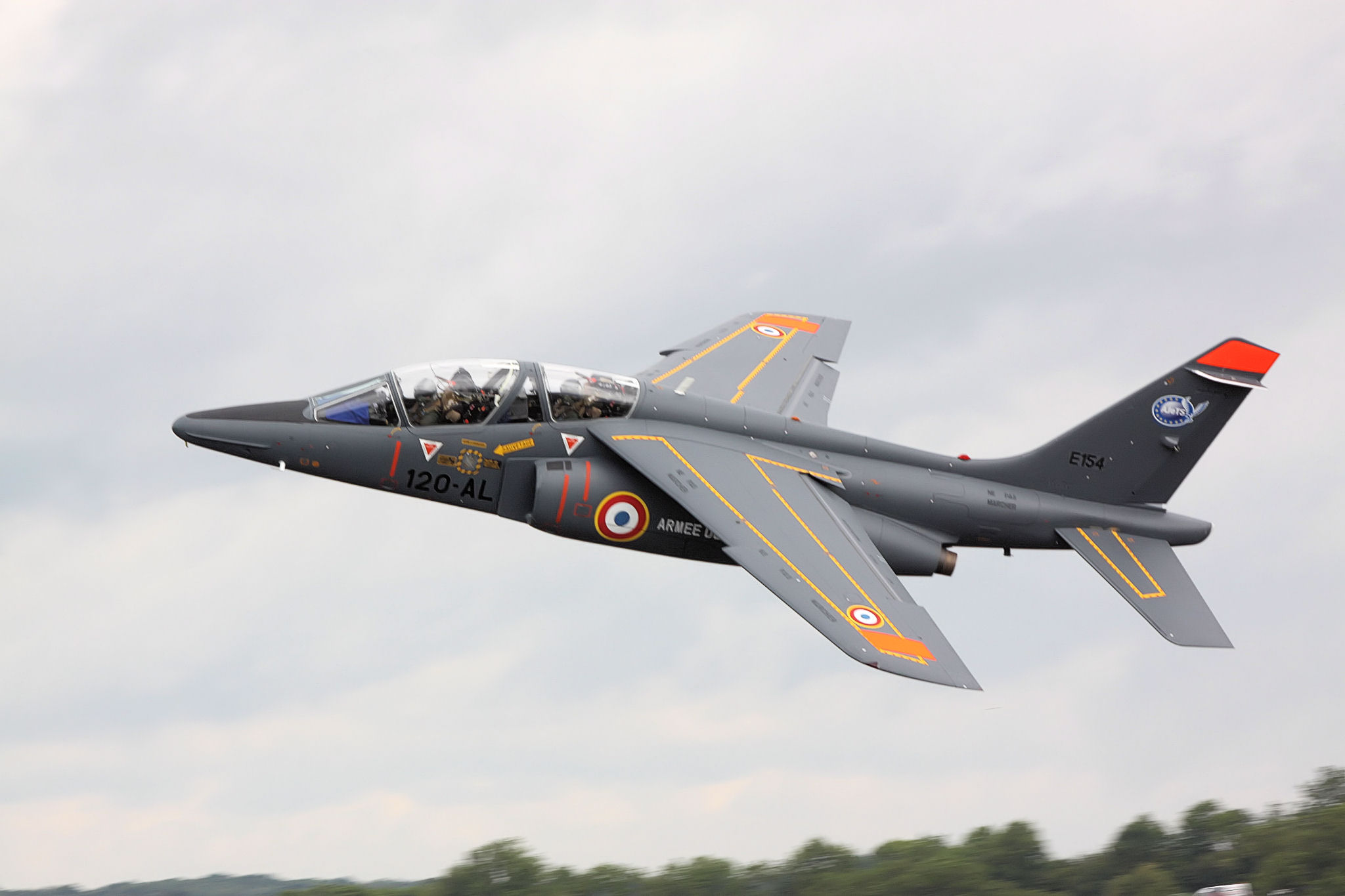 Alpha Jet - RIAT 2009